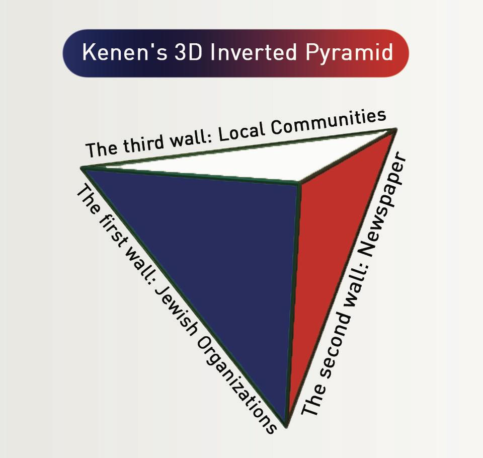 מבנה פרמידה הפוכה כפי שתוארה בעבודת המחקר של קובי ברדה בספרו: AIPAC's Grassroots Path to Congress; How Isiah Kenen Built AIPAC To Be A Powerhouse